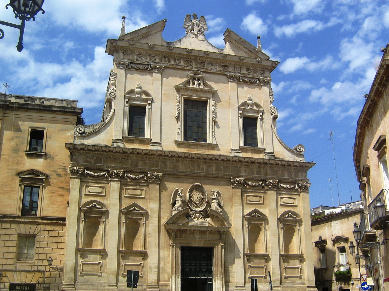 Lecce Chiesa del Gesù